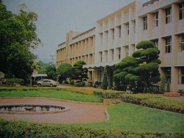 加治木高等学校校舎